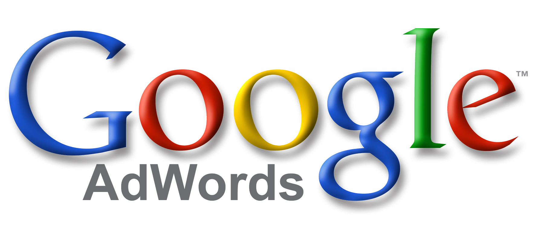 Logo von Google Adwords